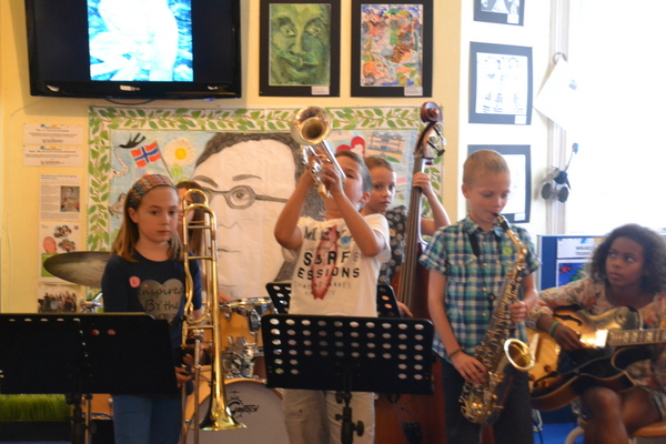 Barn fra Østerrike, Sveits og ulike deler av Norge opptrer sammen på Barnekunstmuseet i forbindelse med festivalen Kids in Jazz